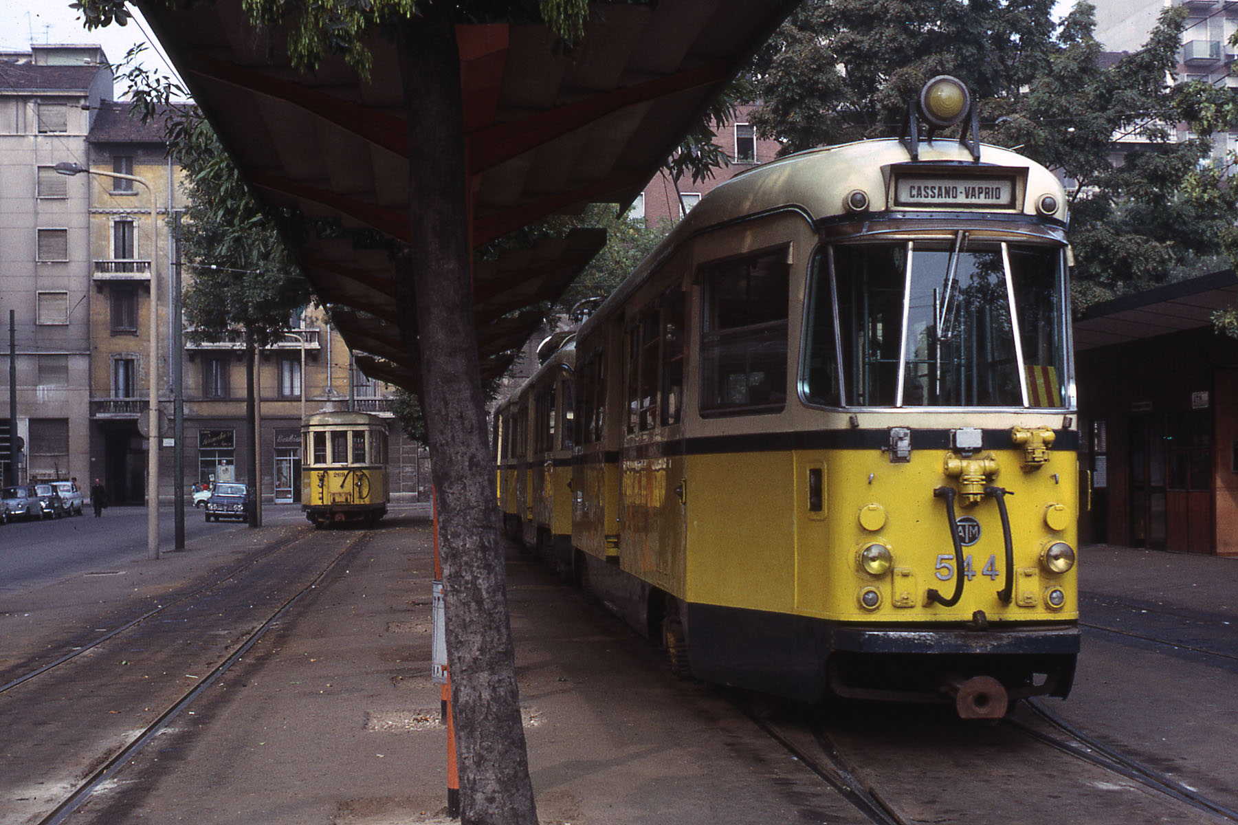 Treno bloccato serie 500 dell'ATM di Milano in sosta al capolinea di piazza Aspromonte della tranvia per Cassano e Vaprio